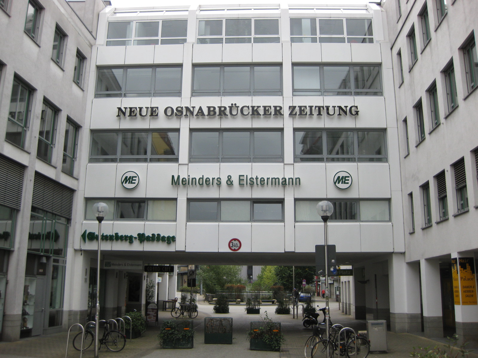 Teil des Gebäudekomplexes von Meinders & Elstermann in Osnabrück: In dem Verlag erschien bis 1967 das Osnabrücker Tageblatt